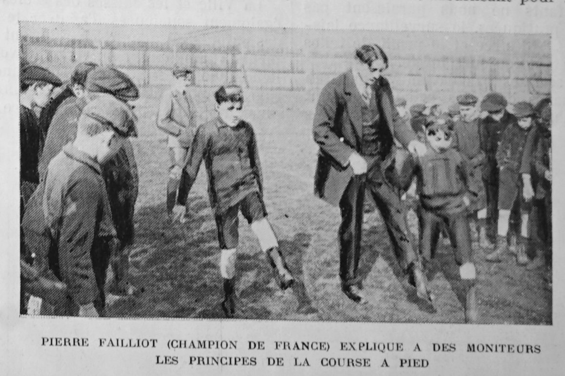 publié dans le "Bulletin de l'œuvre des voyages scolaires".